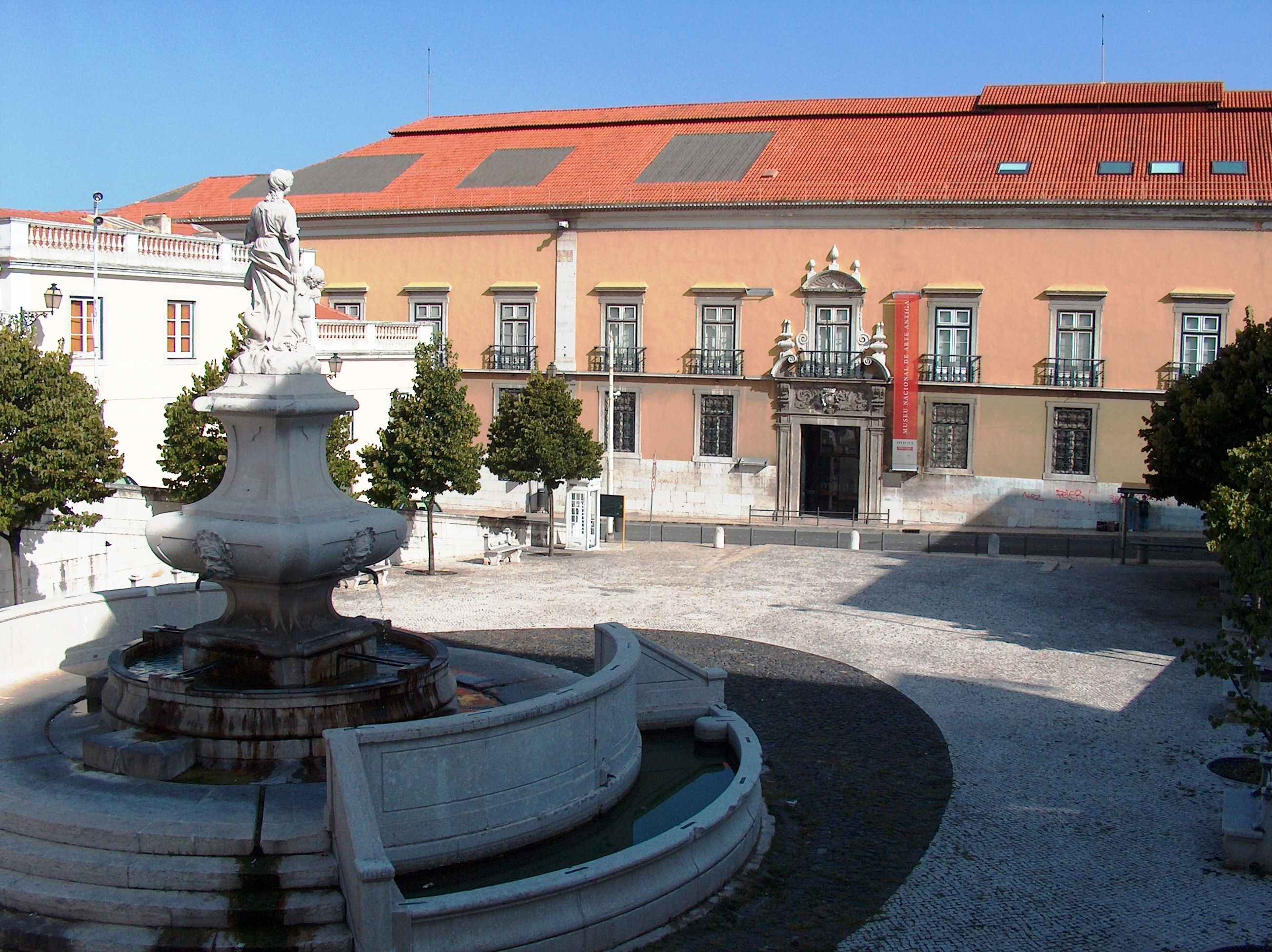 Chafariz das Janelas Verdes, com o Museu Nacional de Arte Antiga ao fundo; Largo Dr. José de Figueiredo, Lisboa - Portugal.